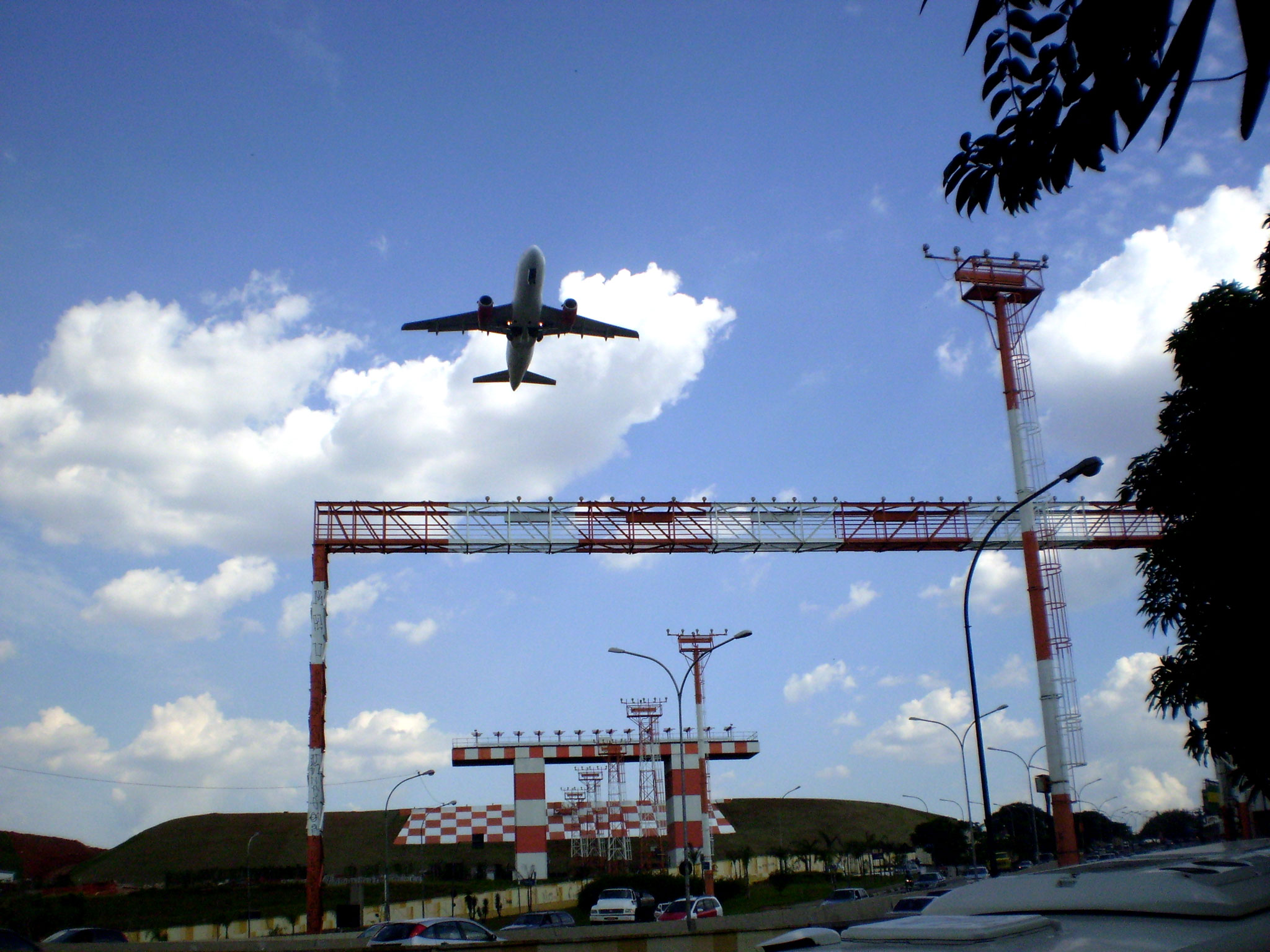 ALS da pista 17R do Aeroporto Internacional de Congonhas / São Paulo